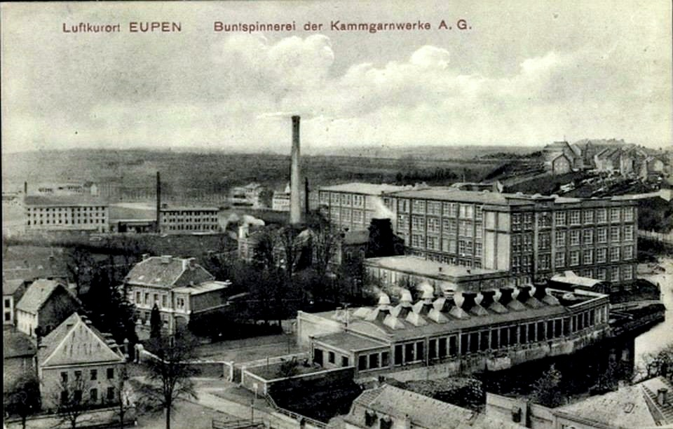 Blick auf das Kammgarnwerk in Eupen um 1920